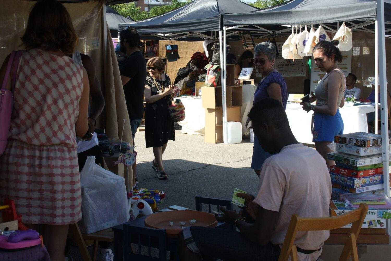 El delegado de Economía y Hacienda, Jorge García Castaño, y la concejala de Arganzuela, Rommy Arce, han visitado este sábado la VI edición de la Feria de Economía Solidaria en Arganzuela, un encuentro que pretende ser un referente para las entidades que se sienten parte del movimiento de Economía Solidaria en Madrid.